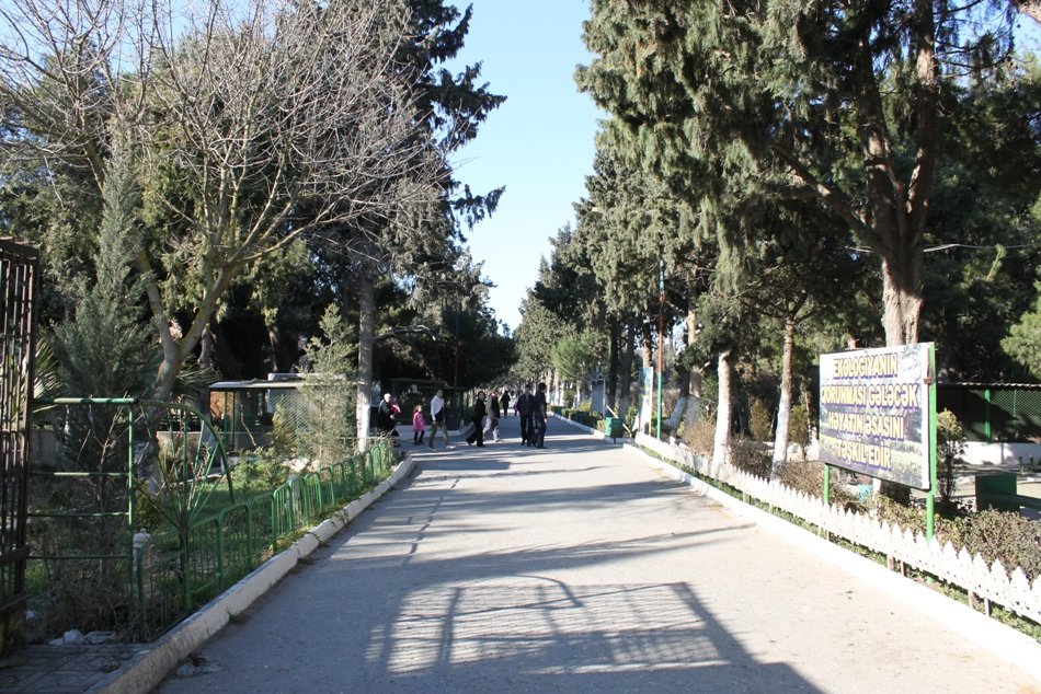 Мардакянский дендрарий